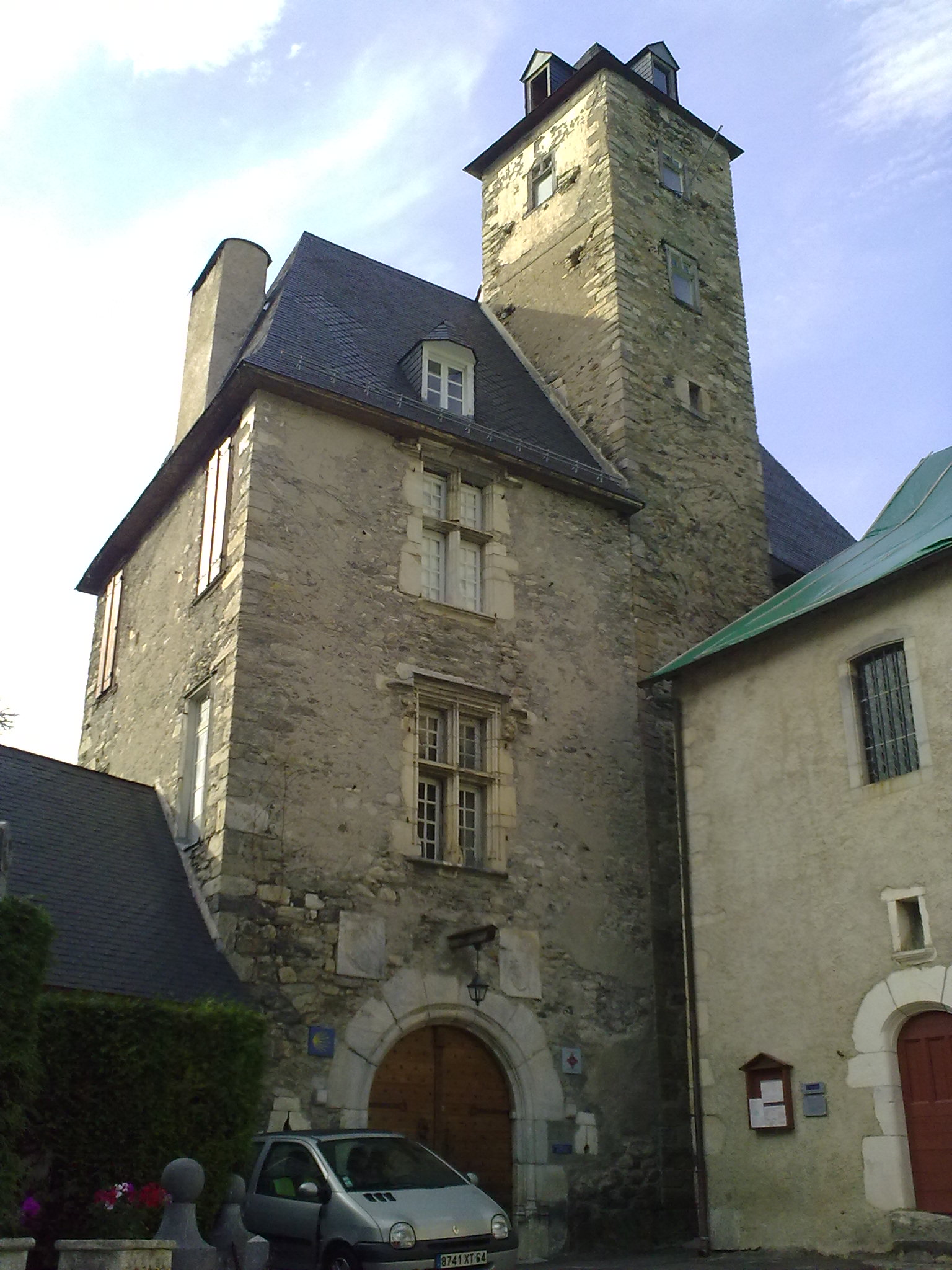 Abbaye de Béost (2).